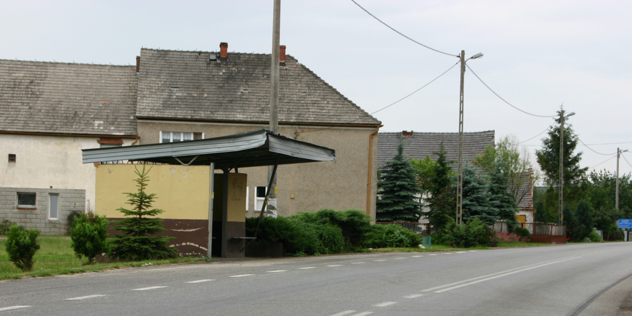 Nowy Dwór Prudnicki (niem. Neuhof) – wieś w Polsce położona w województwie opolskim, w powiecie krapkowickim, w gminie Krapkowice. Object location50° 24′ 08″ N, 17° 53′ 19″ E